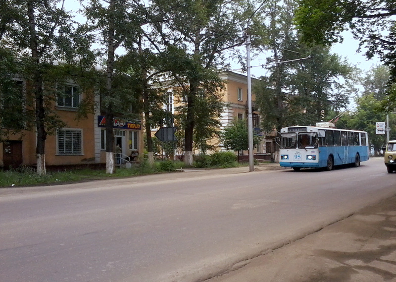 Рубцовск